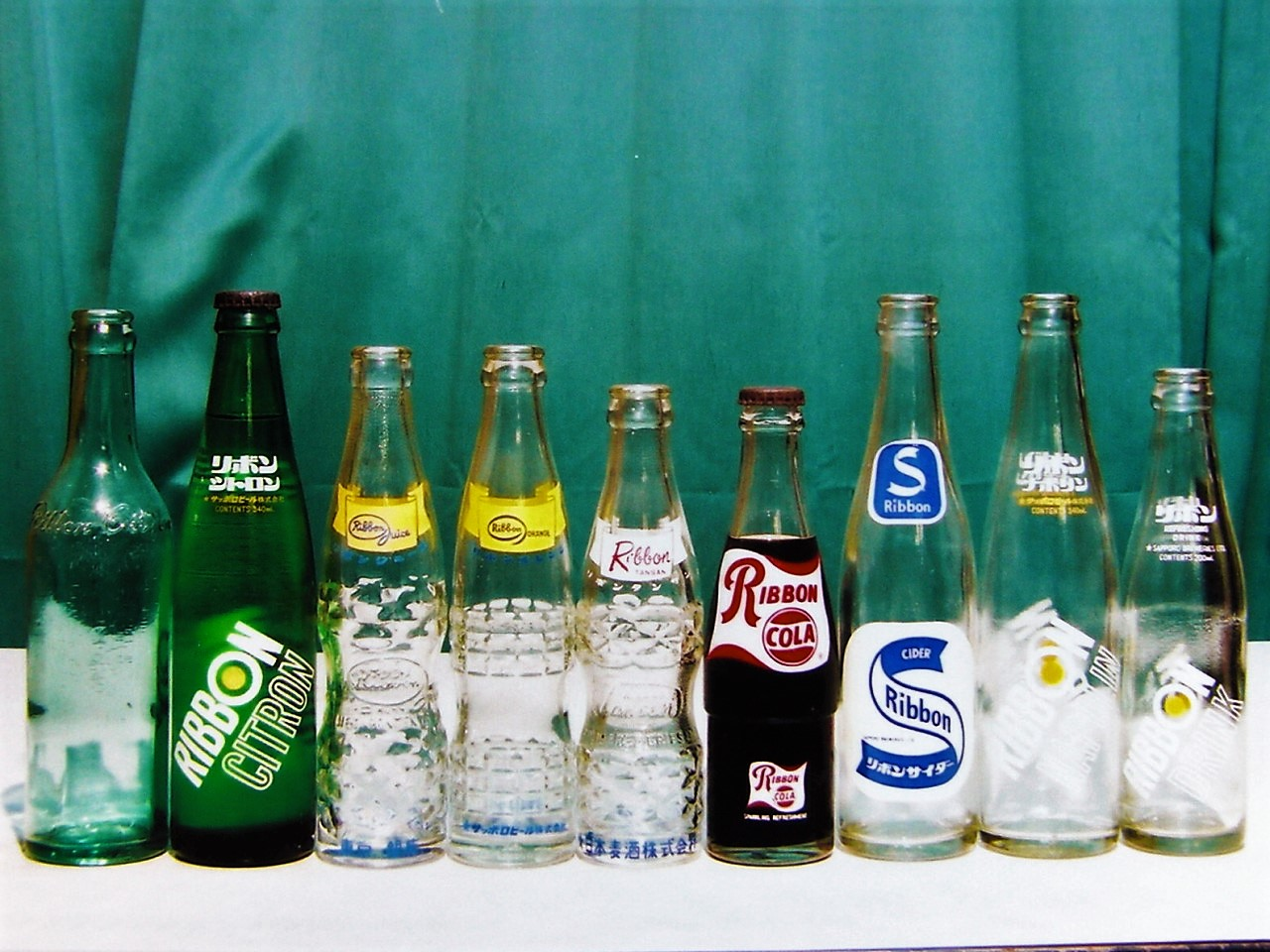 日本麦酒 サッポロビール 清涼飲料水リターナブル瓶